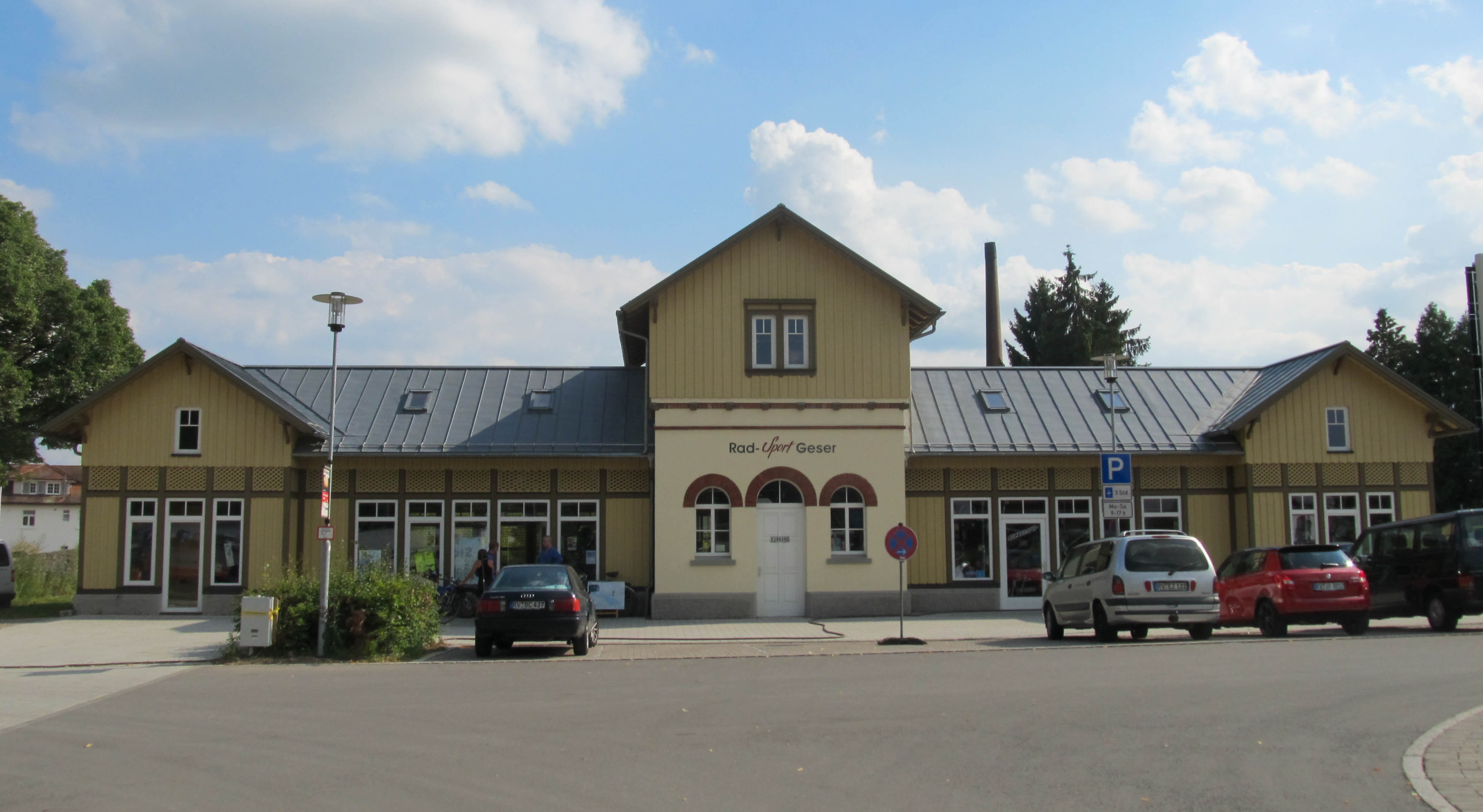 Isnyer Nebengebäude des Leutkirchner Bahnhofes